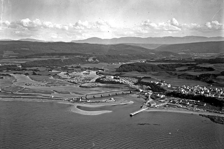 Cap-Chat; la baie de Cap-Chat; son quai et le pont couvert.